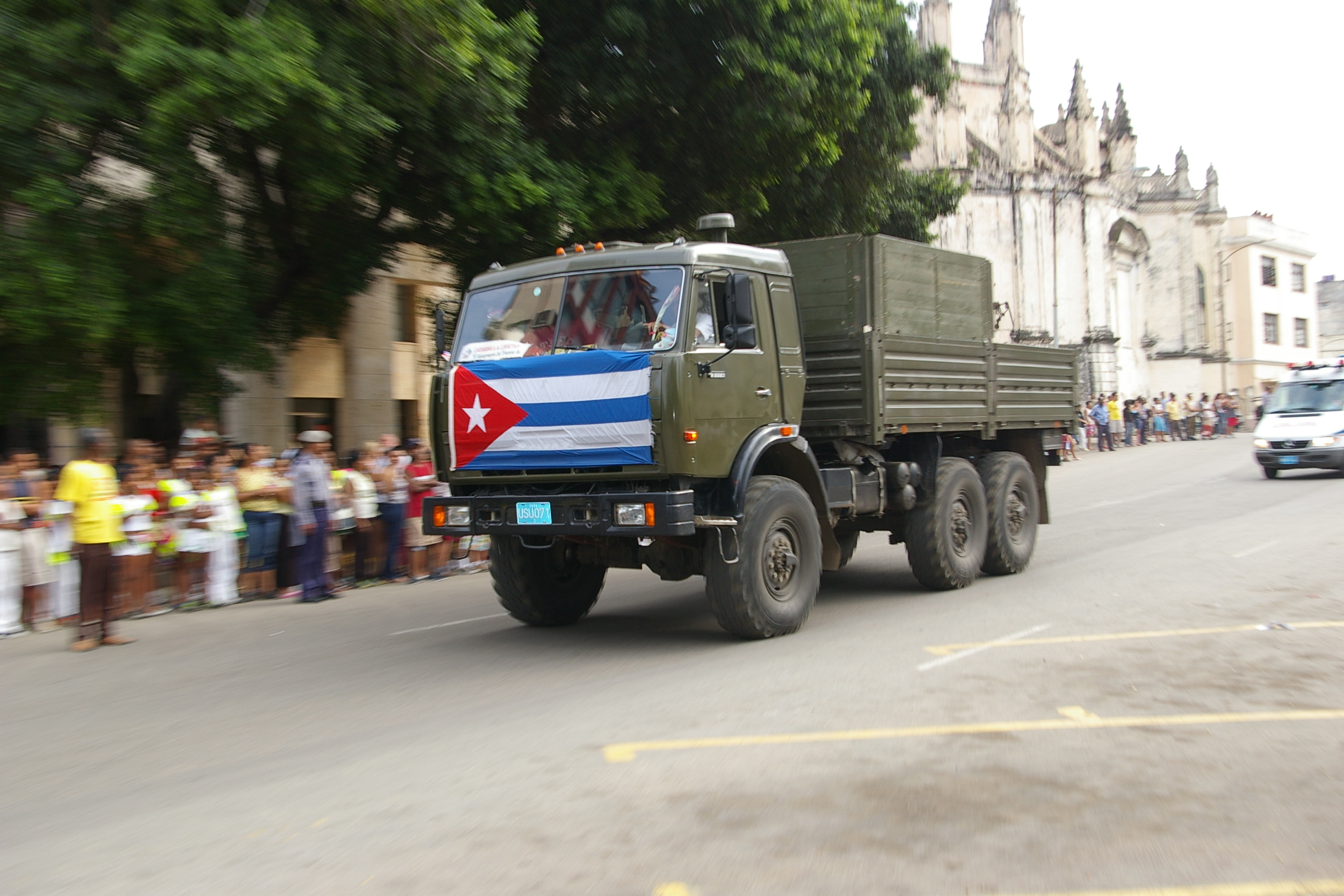 Un camion militaire participe au défilé du 50ème anniversaire de la révolution cubaine. La Havane, le 7 janvier 2009 .